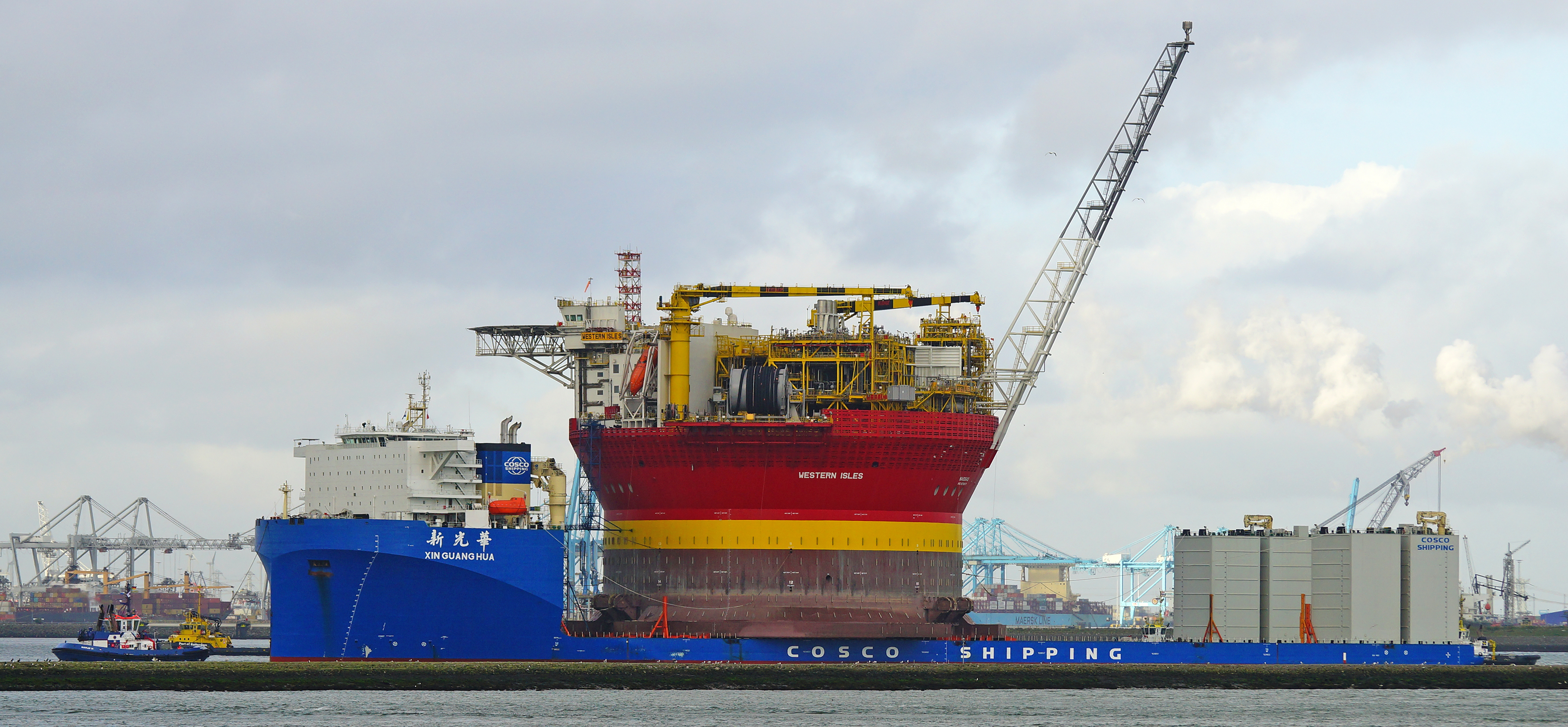 Aankomst in de Maasmond van de XIN GUANG HUA 13-4-2017